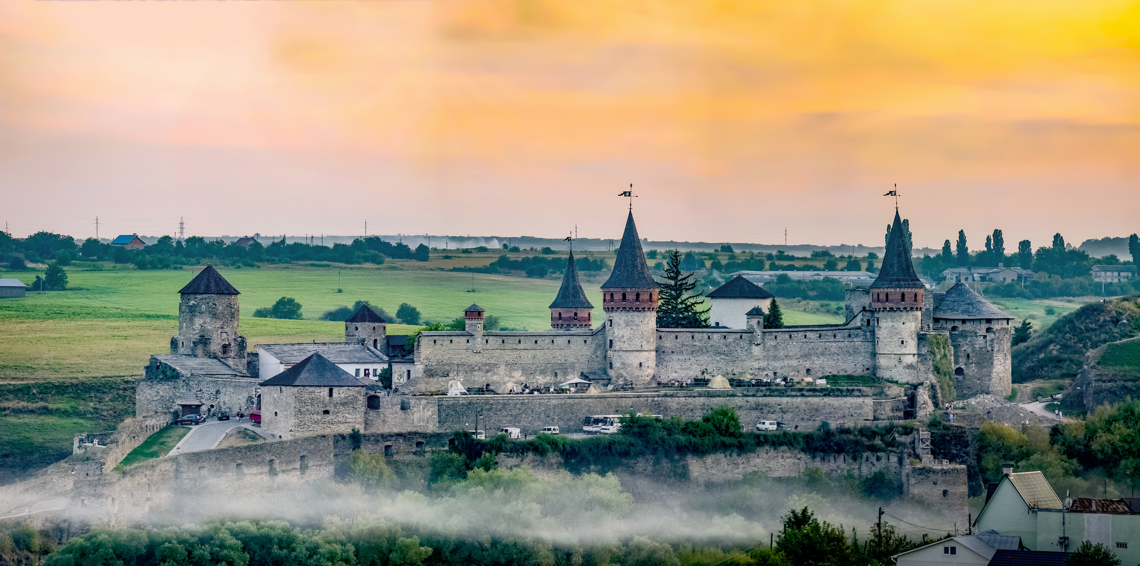 Фортеця, Кам'янець-Подільський, вул. Замкова